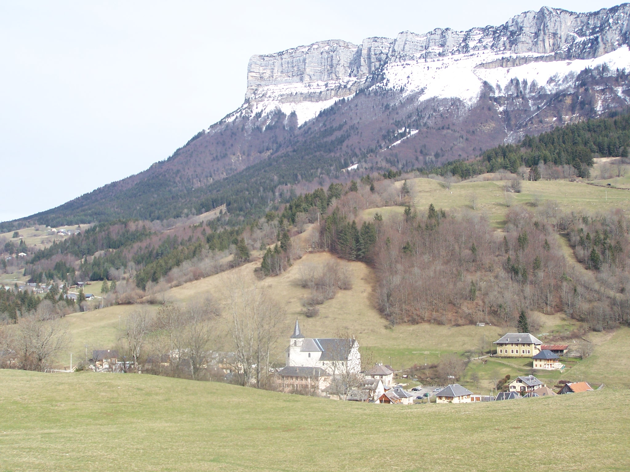 The Savoyan village of Entremont-le-Vieux (France).